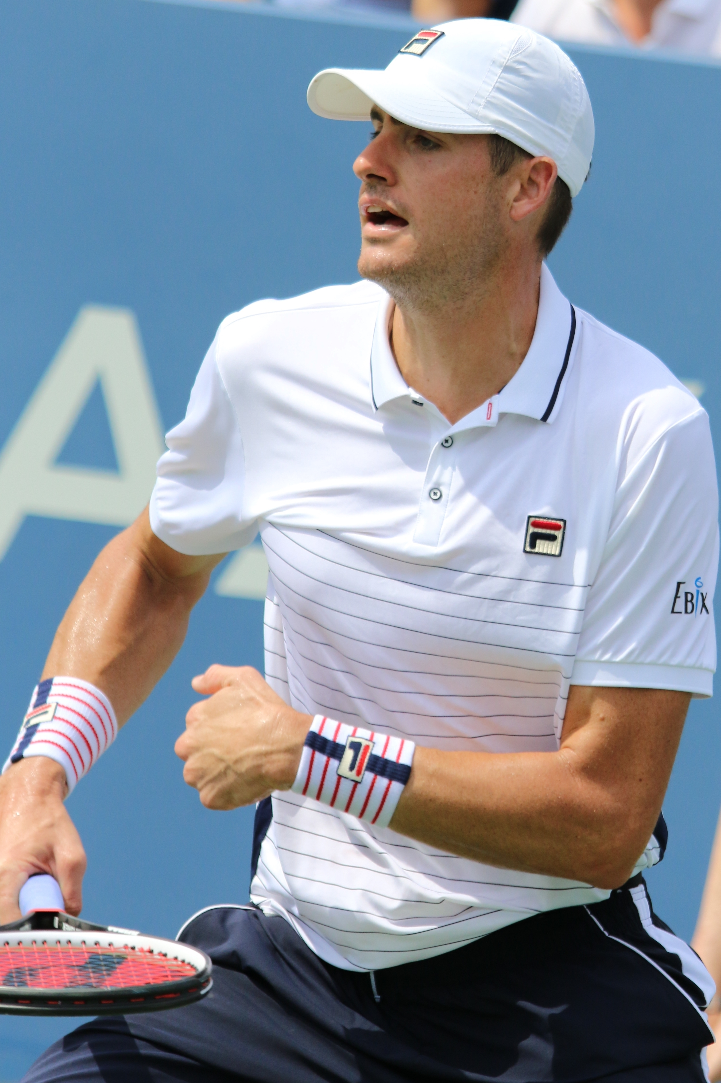 Isner US16 (21)